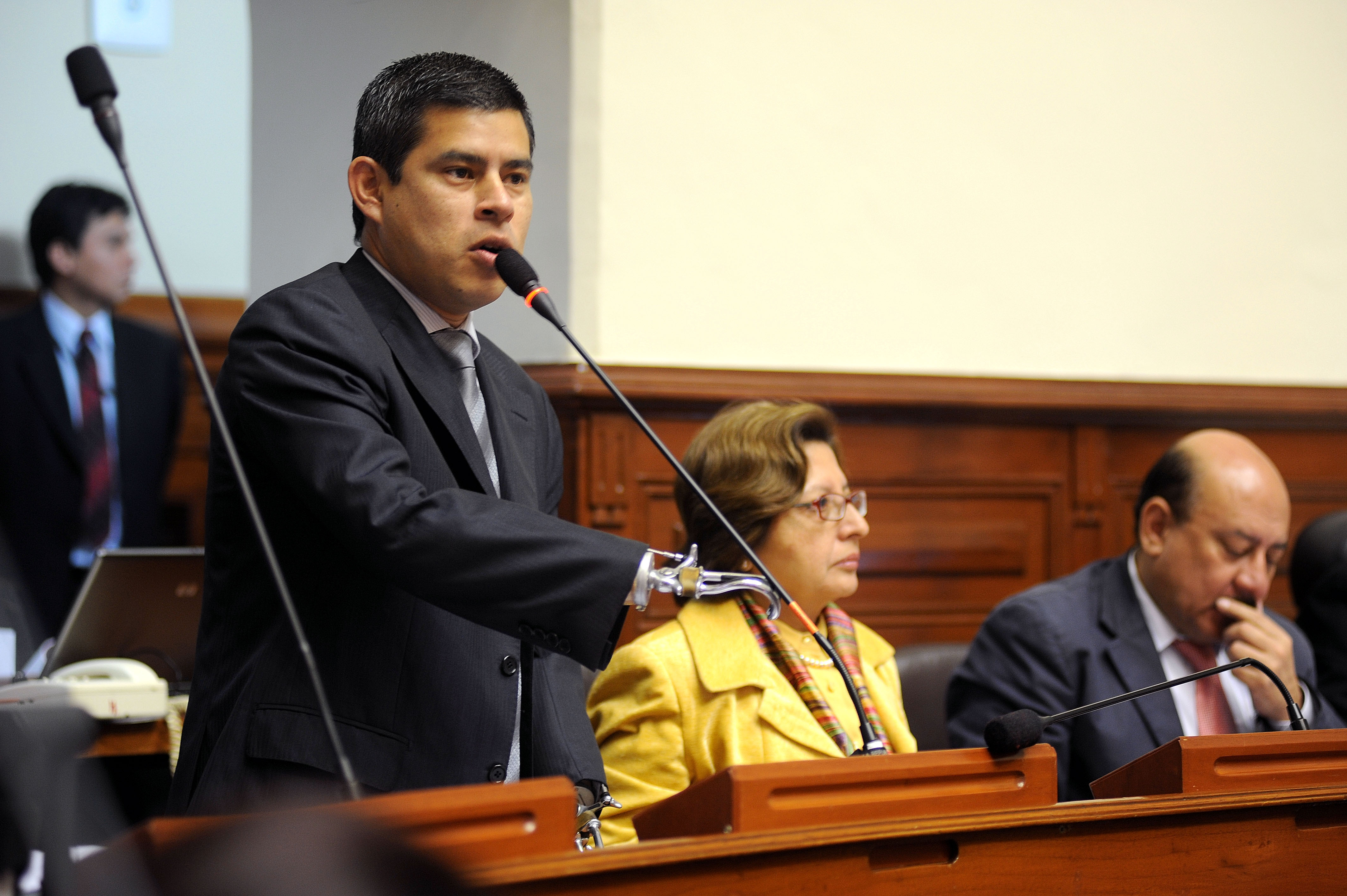 El legislador Luis Galarreta fija su posición en el debate parlamentario realizado esta tarde por el Pleno.